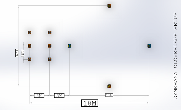 moto gymkhana klaverblad figuur